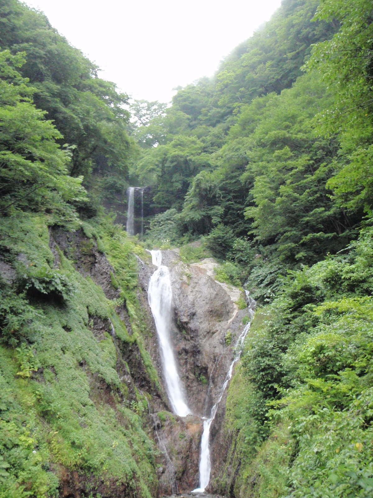 봉래폭포, 울릉군 울릉읍 Bongrae Waterfall in Ulleungdo, or Ulleung Island, may not be as famous or popular as Korea’s most well-known resort island of Jeju or Jejudo. Yet when it comes to beauty and charm, Ulleungdo can still compete.